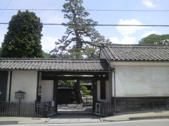 長野県須坂市田中本家博物館正門前